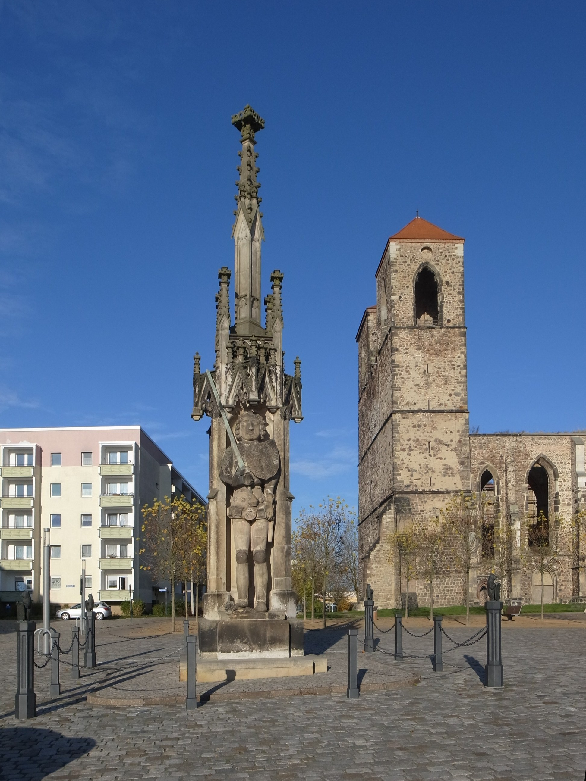 Der Roland in Zerbst/Anhalt. Drittältester auf deutschen Boden. Erstmals Urkundlich nachweisbar 1385 (aus Holz).Frei stehende Sandsteinfigur 1445/46 erschaffen von Meister Curd. Gesamthöhe 9m, Figurgröße 4m. (Quelle: Faltblatt, Herausgeber Tourist-Information Stadt Zerbst/Anhalt)